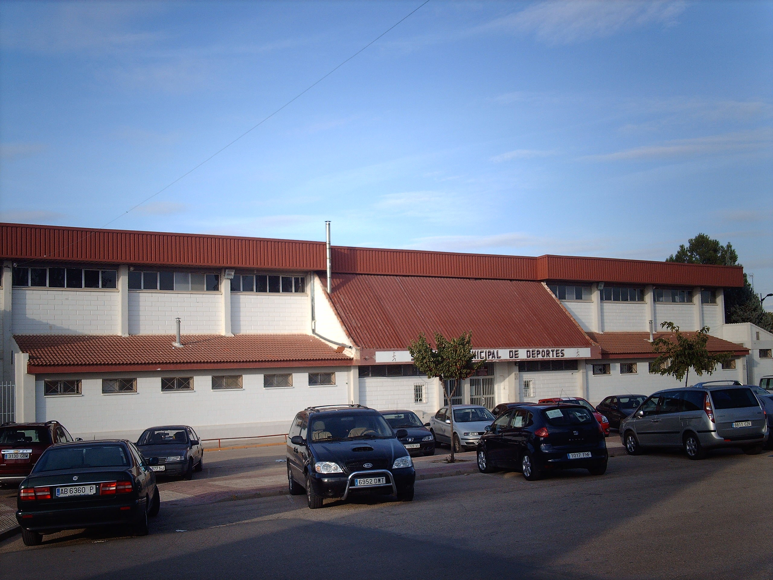 Pabellón Polideportivo del Barrio de los Pintores de Villarrobledo